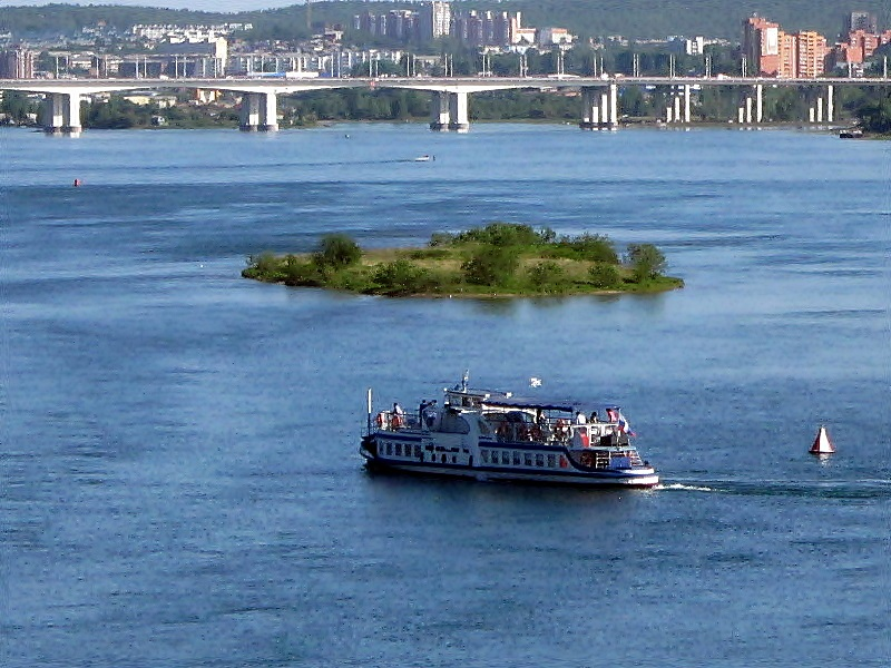 Иркутск. Вид на юг с Глазковского моста. Прогулочный теплоход. Вдали - Академический мост.